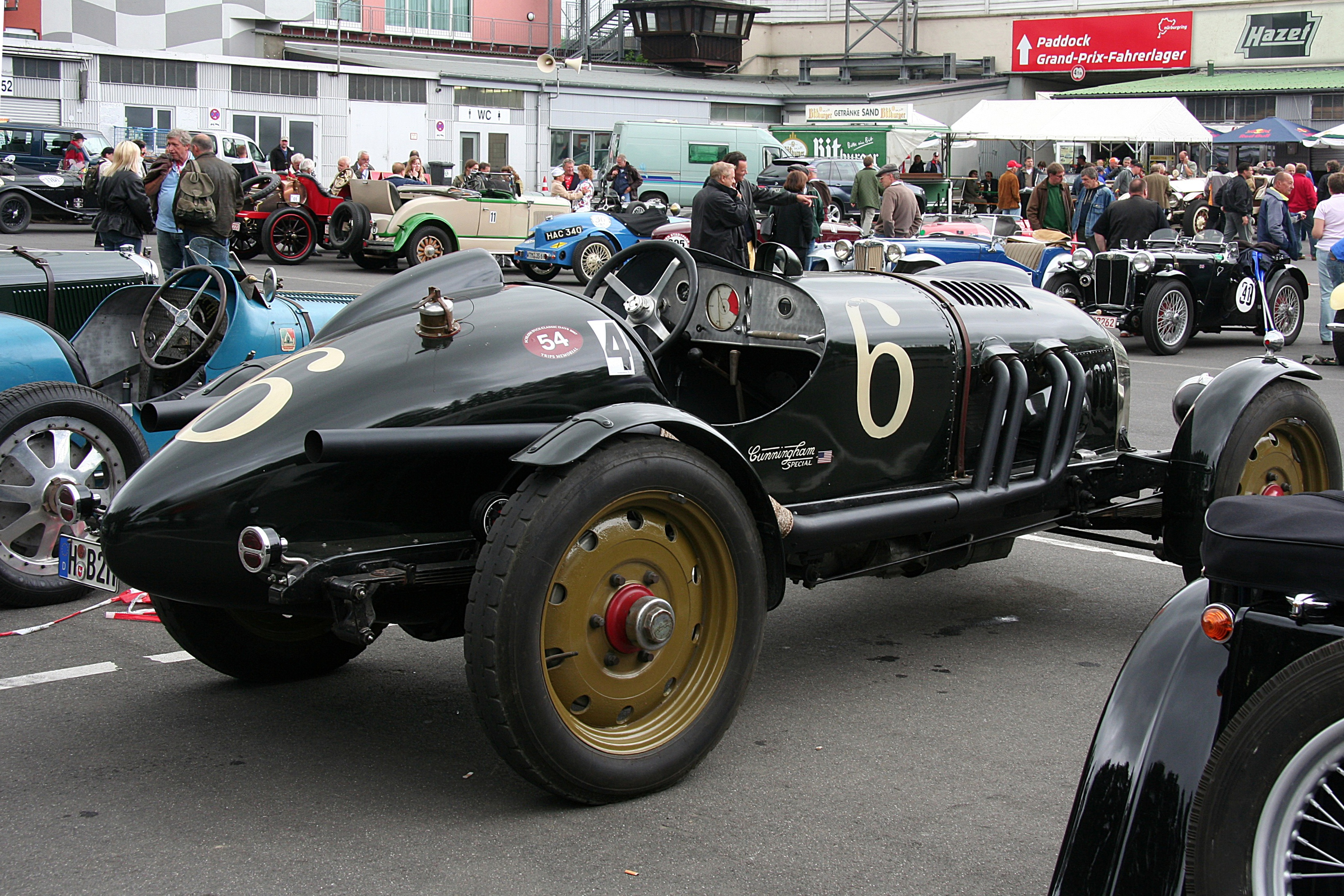 Oldtimer Festival des DAMC auf dem Nürburgring (altes Fahrerlager), im Vordergrund Cunningham Special, Baujahr 1924